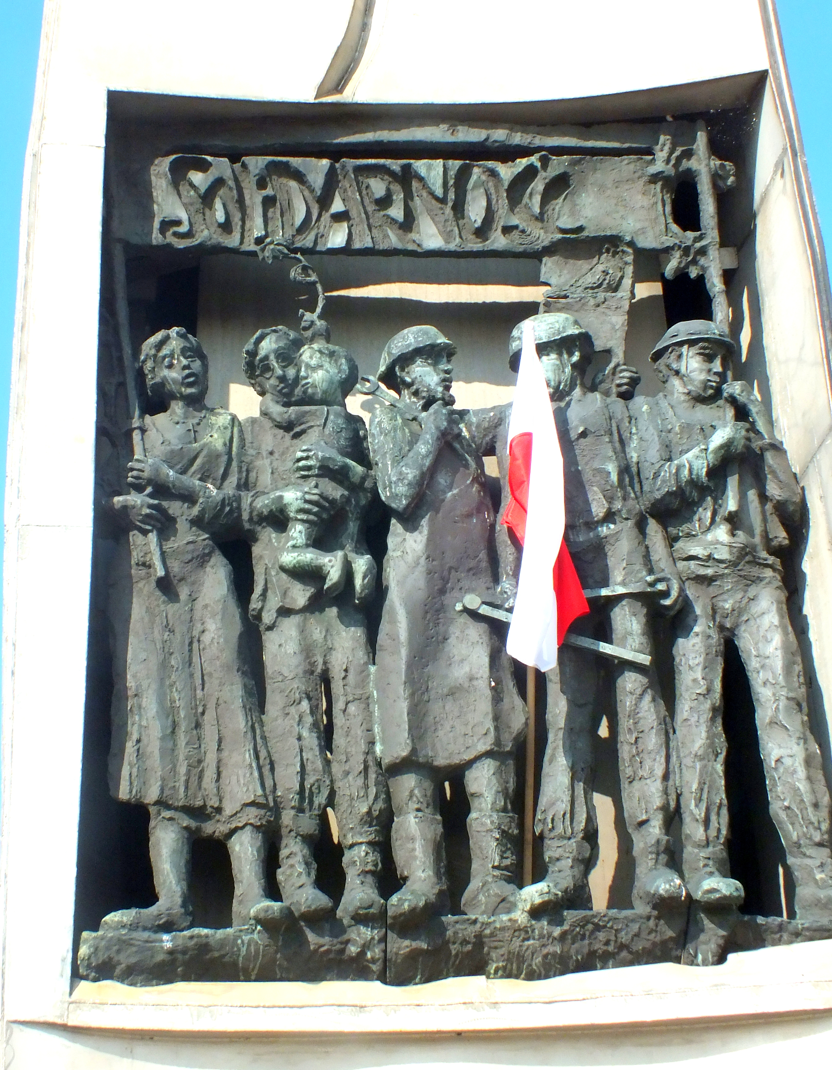 Pomnik Poległych Stoczniowców 1970